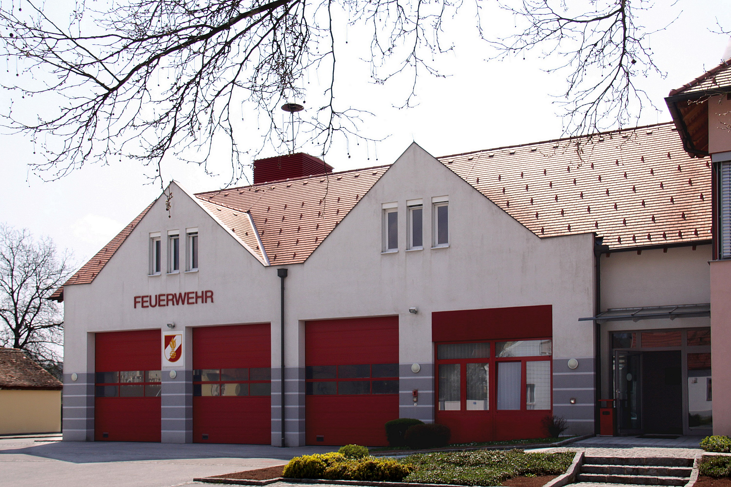 Riedlingsdorf - Feuerwehrhaus Object location47° 20′ 40.95″ N, 16° 08′ 11.68″ E